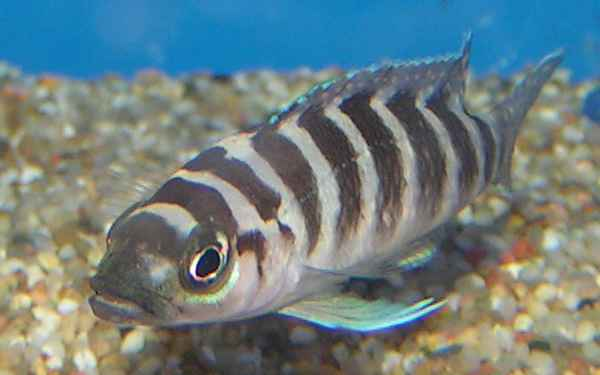 Adult Neolamprologus cylindricus in an aquarium